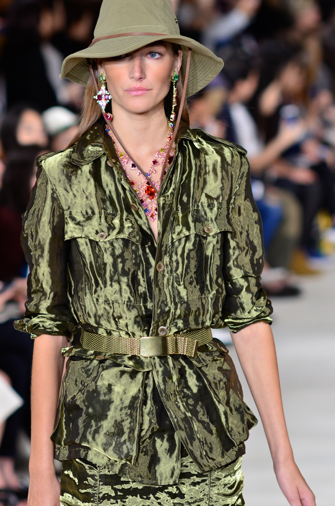 Josephine Le Tutour walking the Ralph Lauren Spring/Summer fashion show.